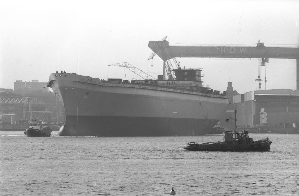 Das neue Containerschiff wird aufgeschwommen. Das Schwesterschiff des Containerschiffes BENALDER baut Howaldtswerke Deutsche Werft (HDW) für die schottische Reederei Benlines. Im Vordergrund rechts Schlepper CORMORAN und im Hintergrund links Schlepper ROBBE.